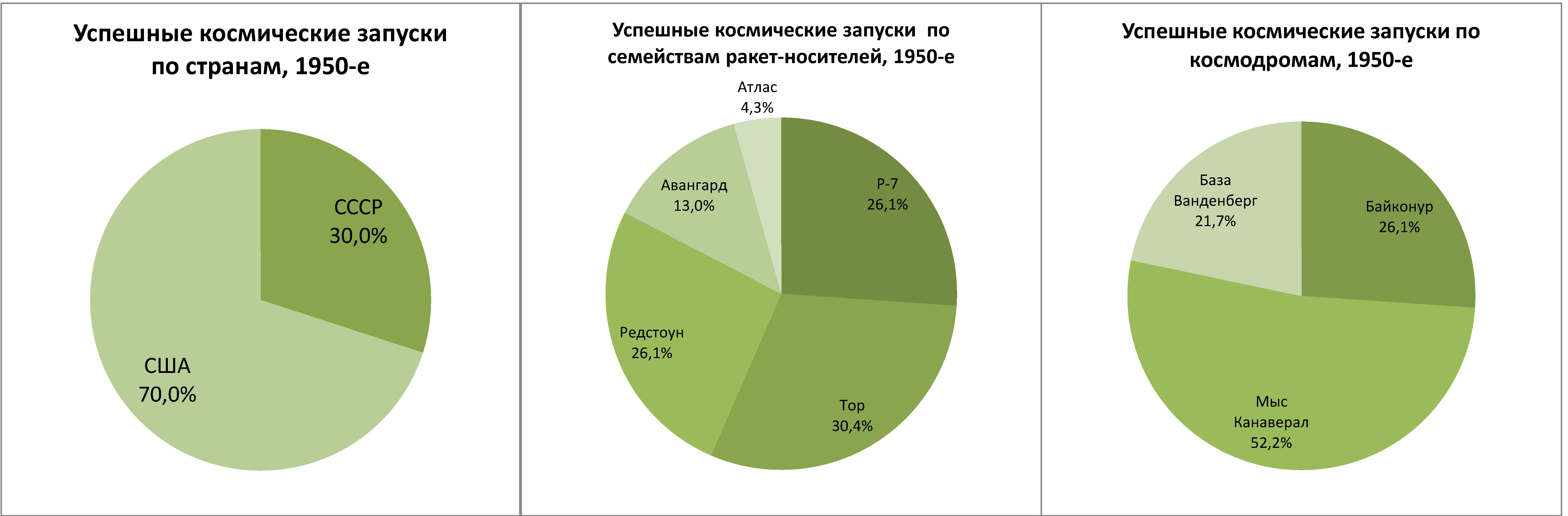 Диаграммы соотношения количества успешных космических запусков в разрезе стран, ракет-носителей и космодромов в 1950-е годы. Диаграммы построены на основании АИ используемых в статье Список космических запусков и в соответствии с используемой в них методологией.